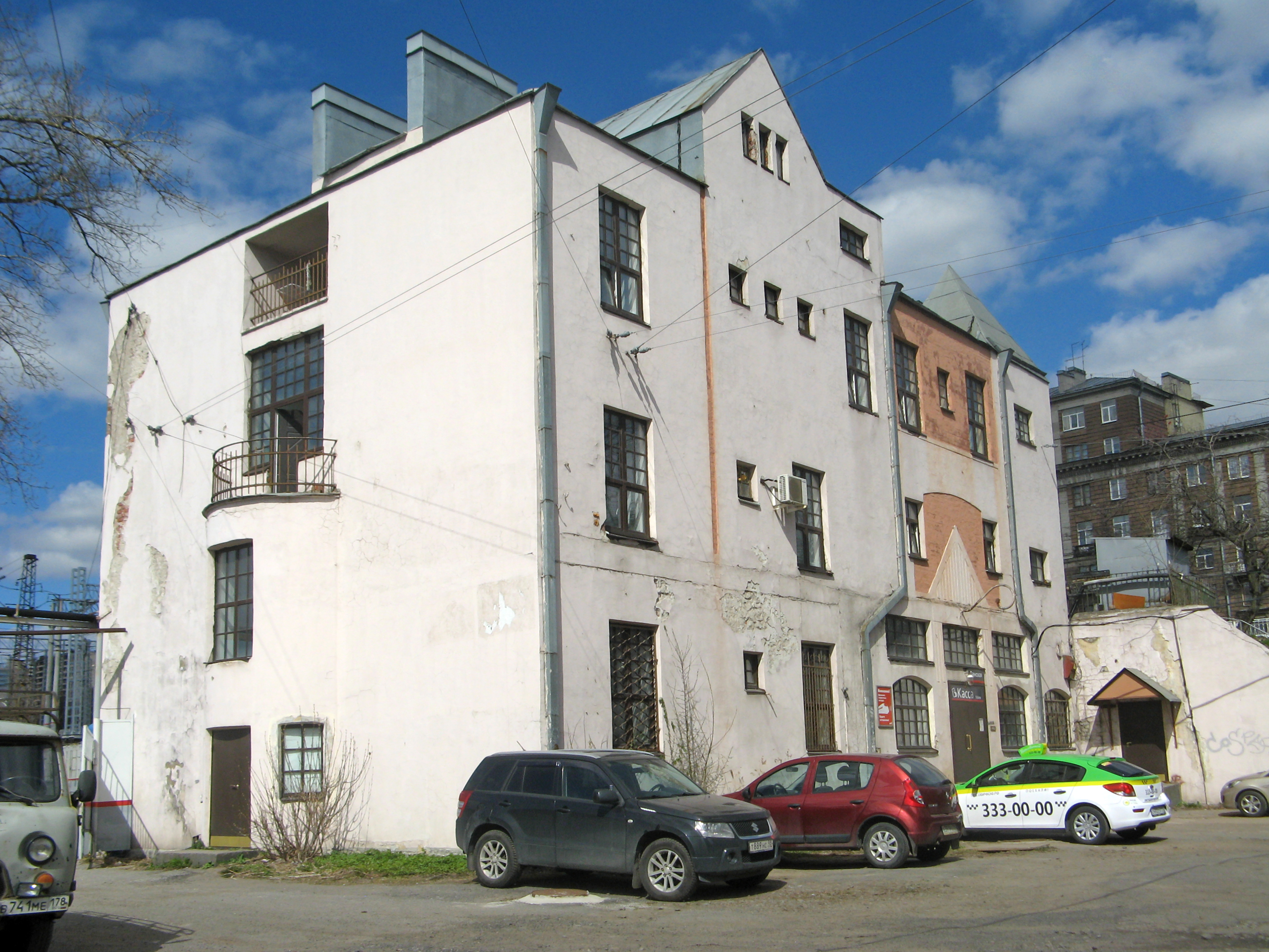 Вокзал железнодорожной станции 'Ланская': Сердобольская улица, 3, Выборгский район, Санкт-Петербург